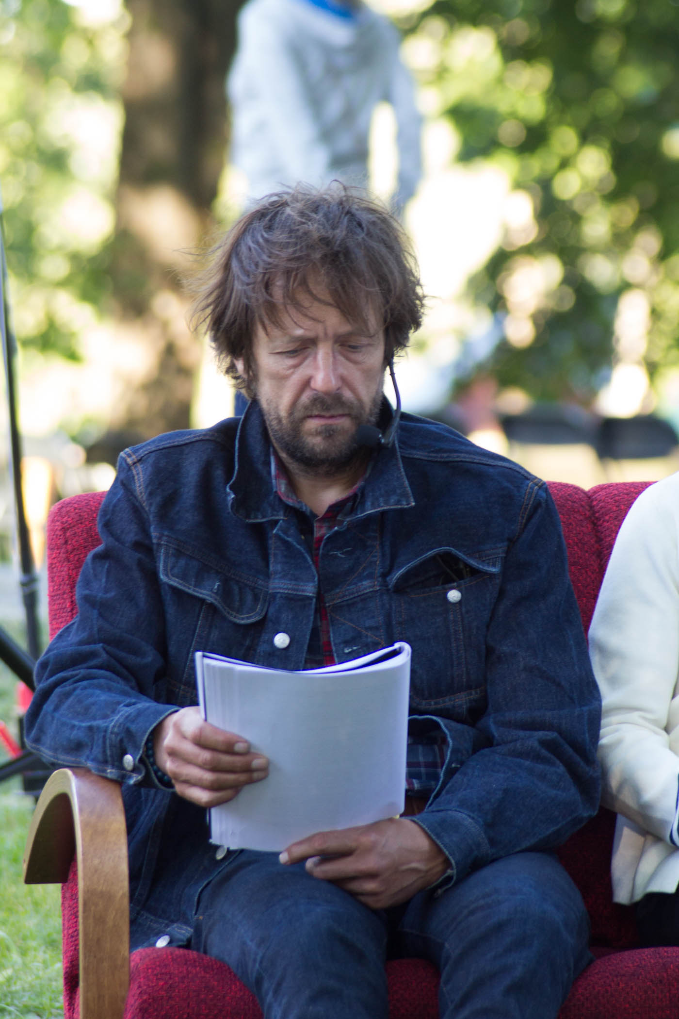 Ivo Uukkivi Arvamusfestivalil Ekspress Meedia alal.